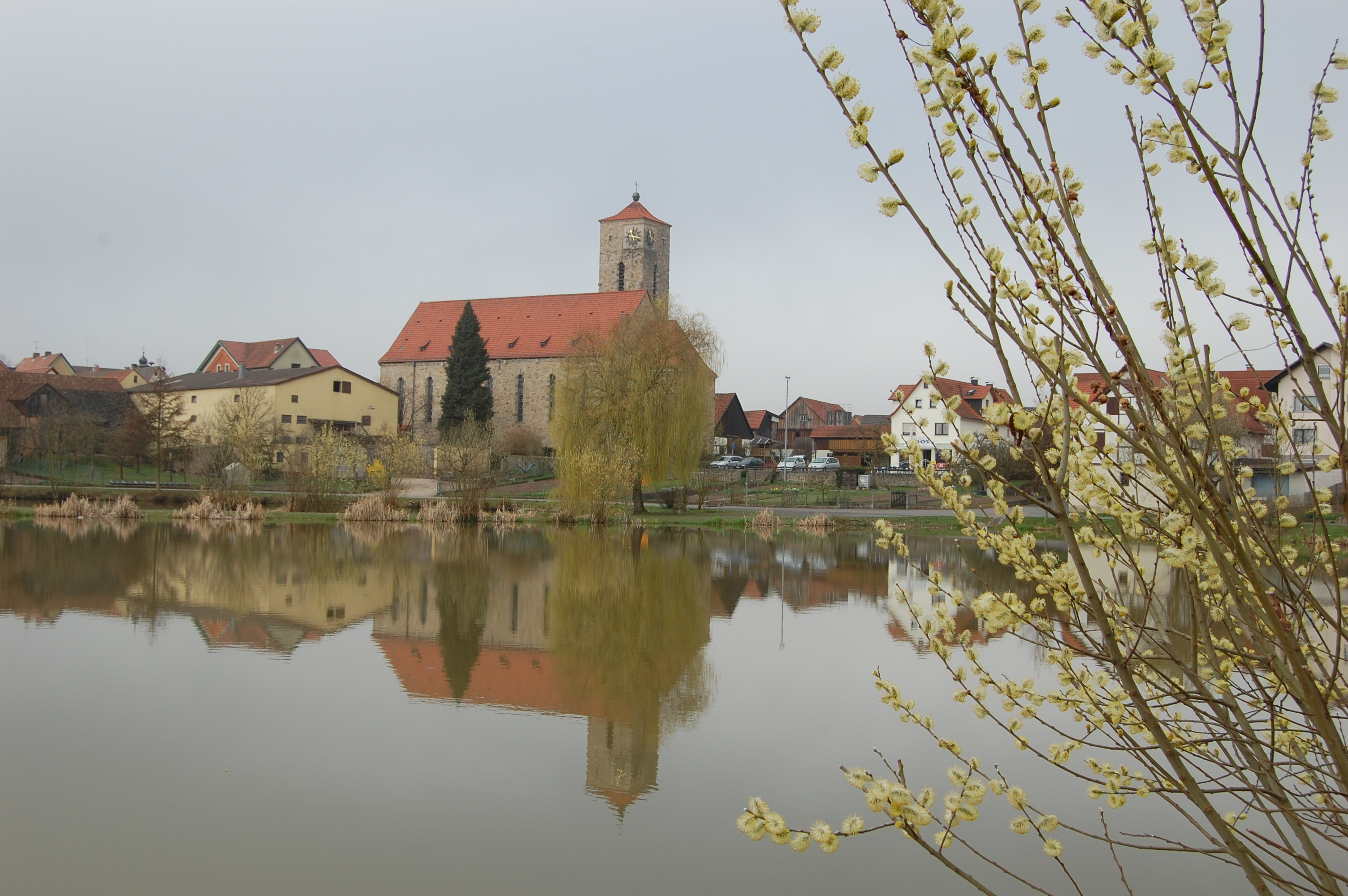 Hohenroth, Kreis Rhön-Grabfeld (2011)